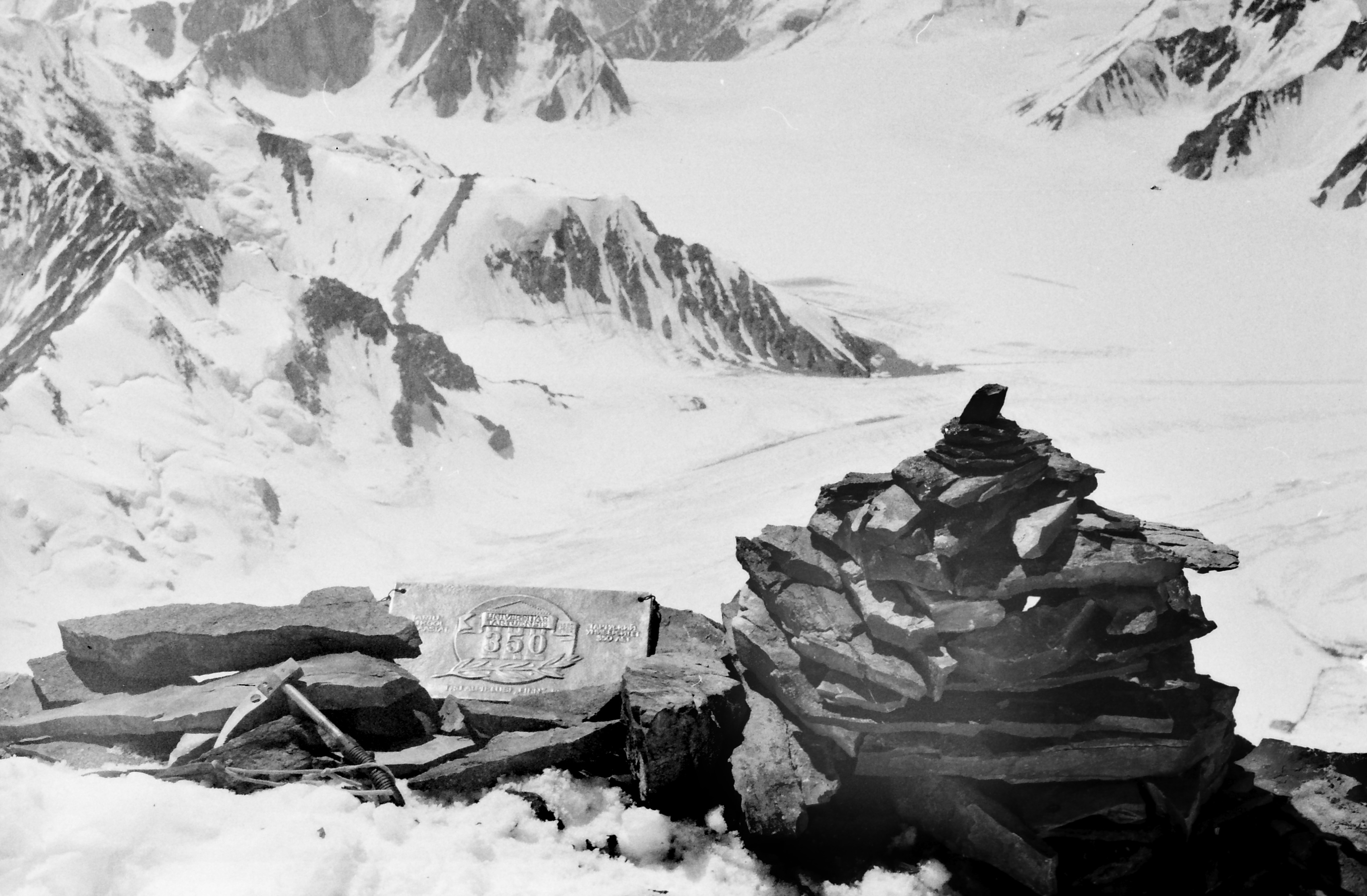 Ekspeditsioon mäetipule "Tartu Ülikool 350". Ülikooli tipp 6350m.